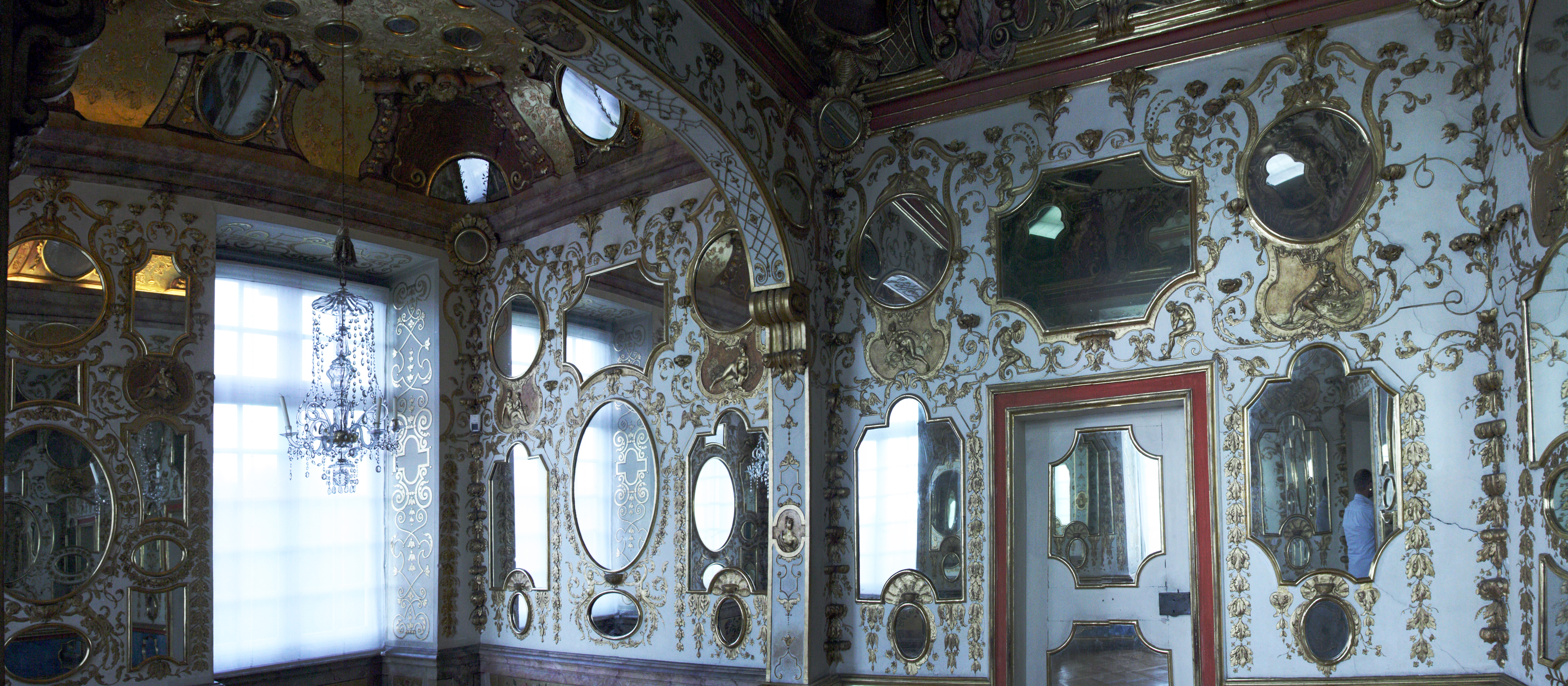 Spiegelkabinett im Residenzschloss Ludwigsburg, alle Spiegel sind aus der Manufaktur Spiegelberg. In diesem Zimmer starb Herzog Karl Alexander von Württemberg), erster katholischer Herzog in Württemberg.